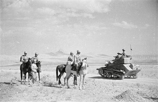 Части советской и английской армии встретились у Кавзина.